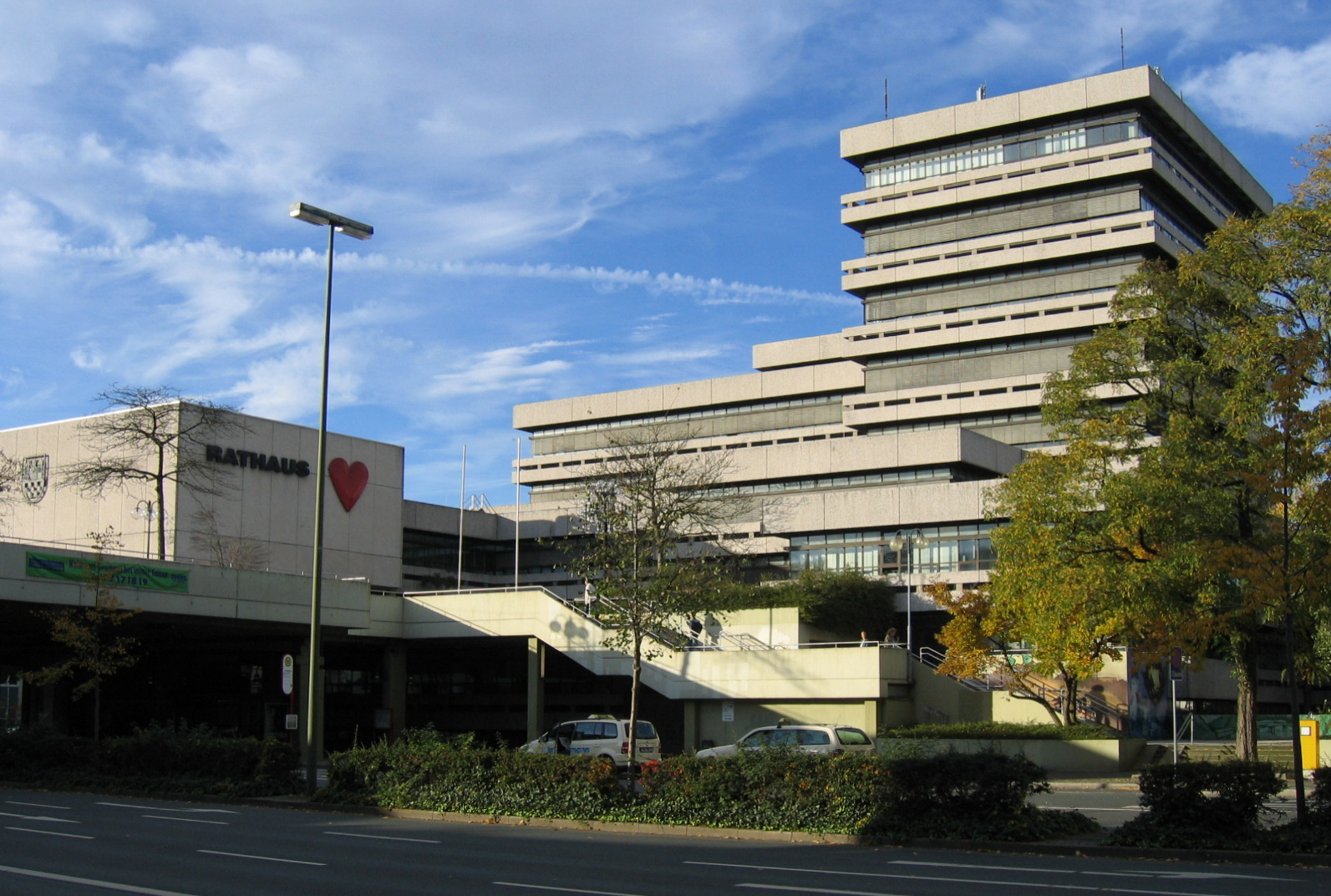 Rathaus in Iserlohn, Schillerplatz 7 This image shows a heritage building in Germany, located in the North Rhine-Westphalian city Iserlohn (no. 248). Source: selbst fotografiert Date: 27. Okt. 2005 Author: Bubo bubo